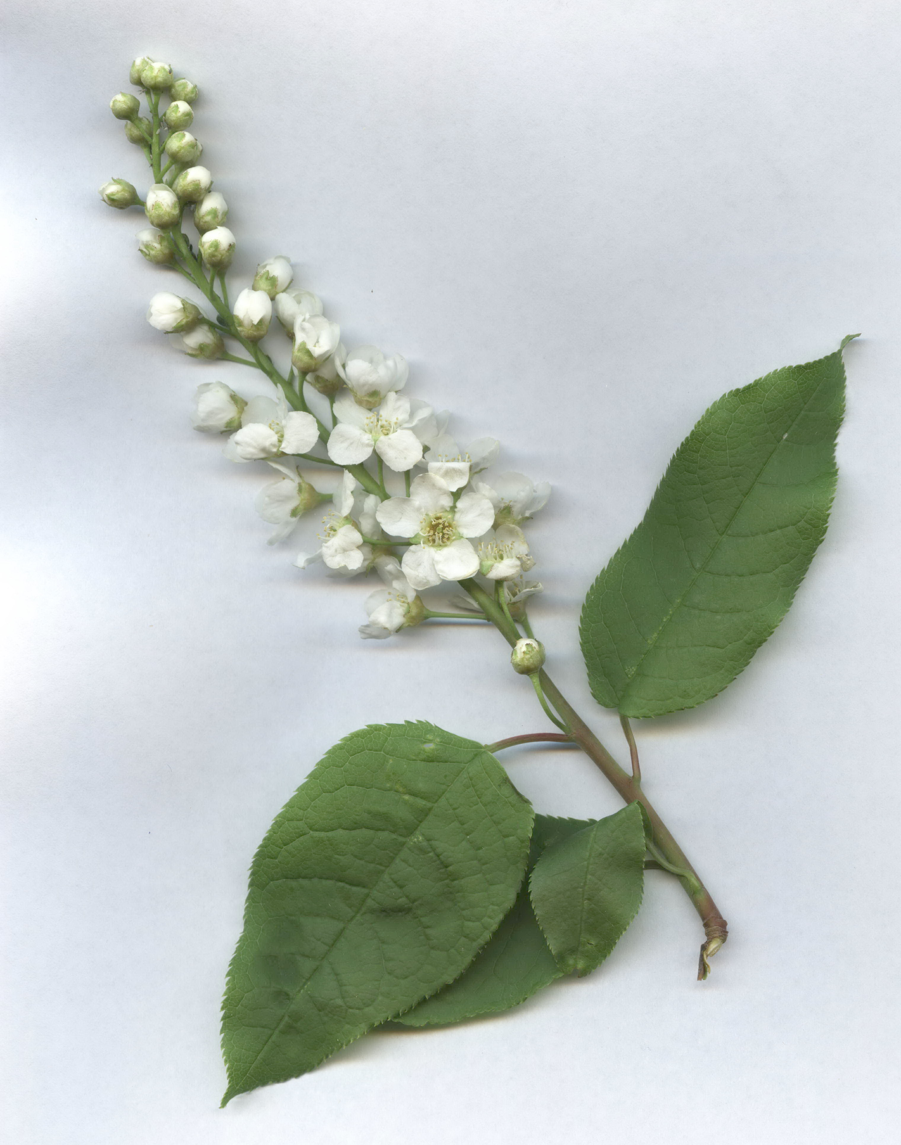 Prunus padus (syn. Padus racemosa (Lam.) Gilib.). Flowers and leaves. Russia, Ukhta. Scanned. Черёмуха обыкновенная, соцветия, листья. Россия, Ухта.